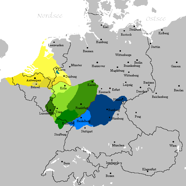 kleinere Ausbesserungen